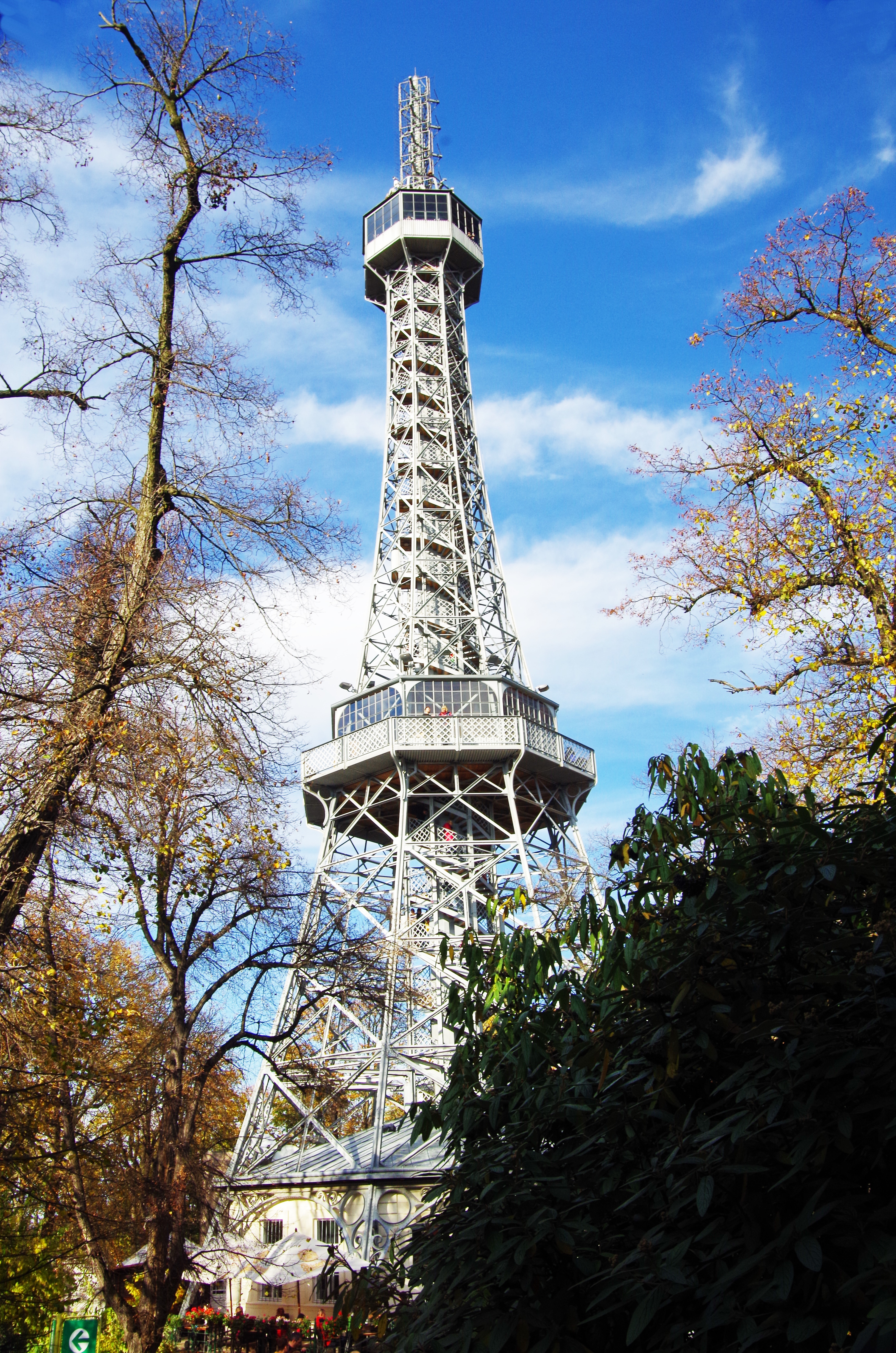 Aussichtsturm Petrin